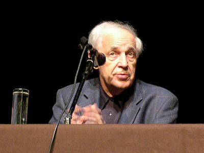 Pierre Boulez durante una conferencia en el Palais des Beaux-Arts de Bruselas (Bélgica), el 25 de octubre de 2004.